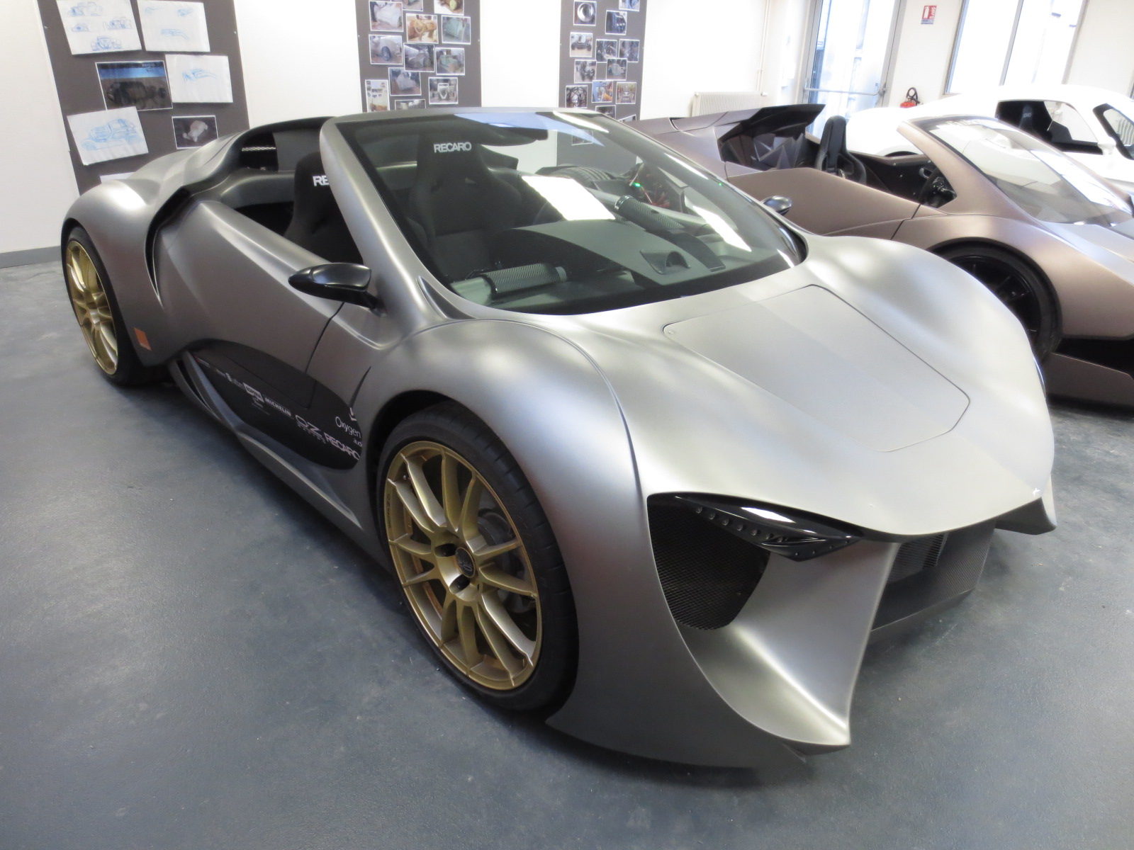 Sbarro Speed'R - Show room de l'école Espera Sbarro de Montbéliard